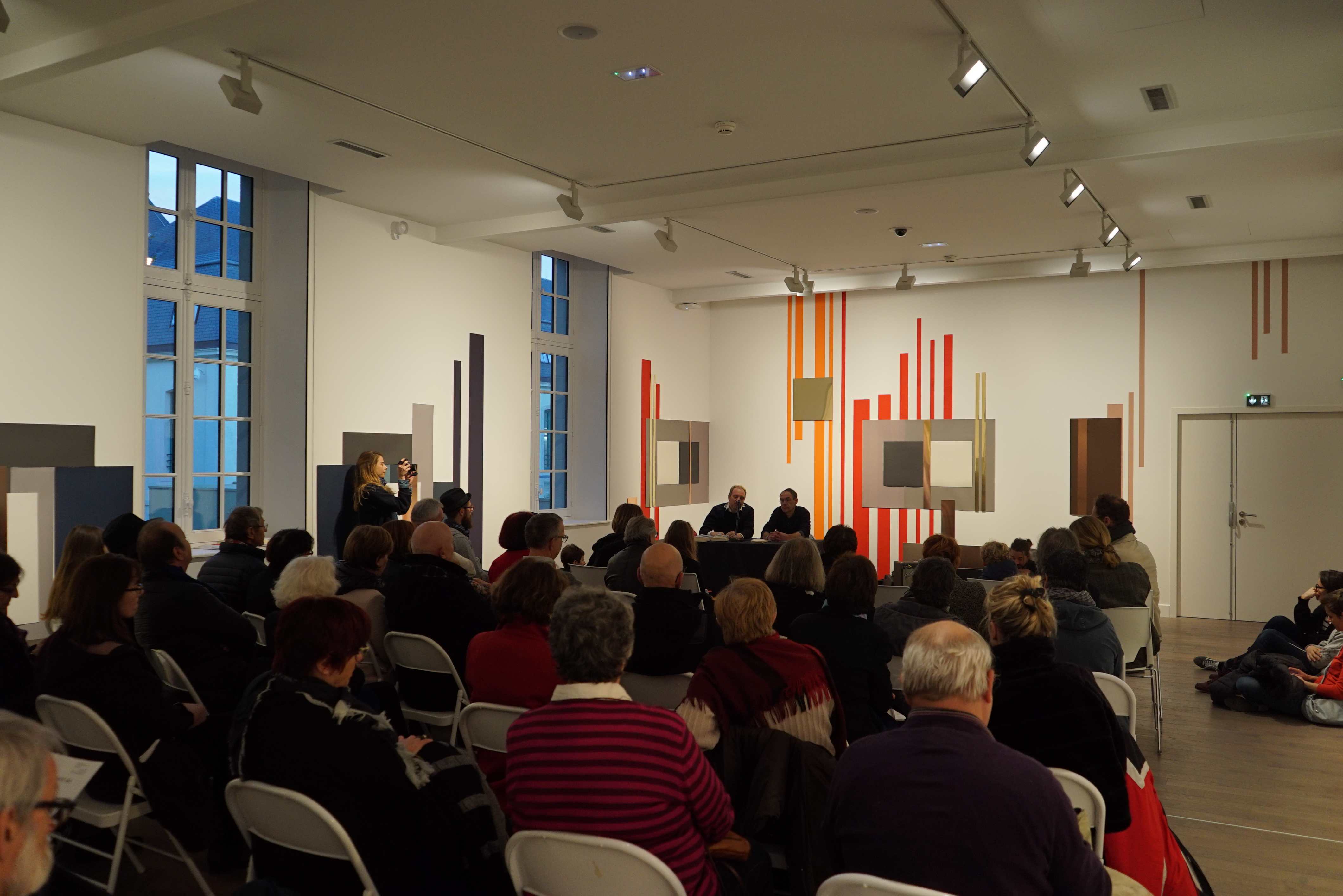 lors de l'action "WE FRAC" 2016 en Champagne-Ardenne. Lecture par Georges-André Vuaroqueaux et Charlemagne Ganashine, décoration murale par Meris Angioletti